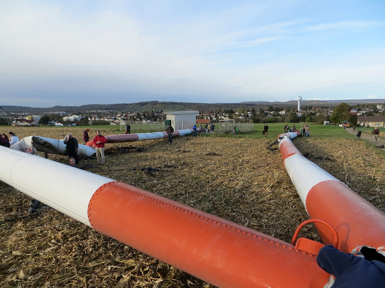 Sender Mühlacker. Nach dem Abriss des 130m hohen Reservesenders durch Kappen zweier Halteseile.